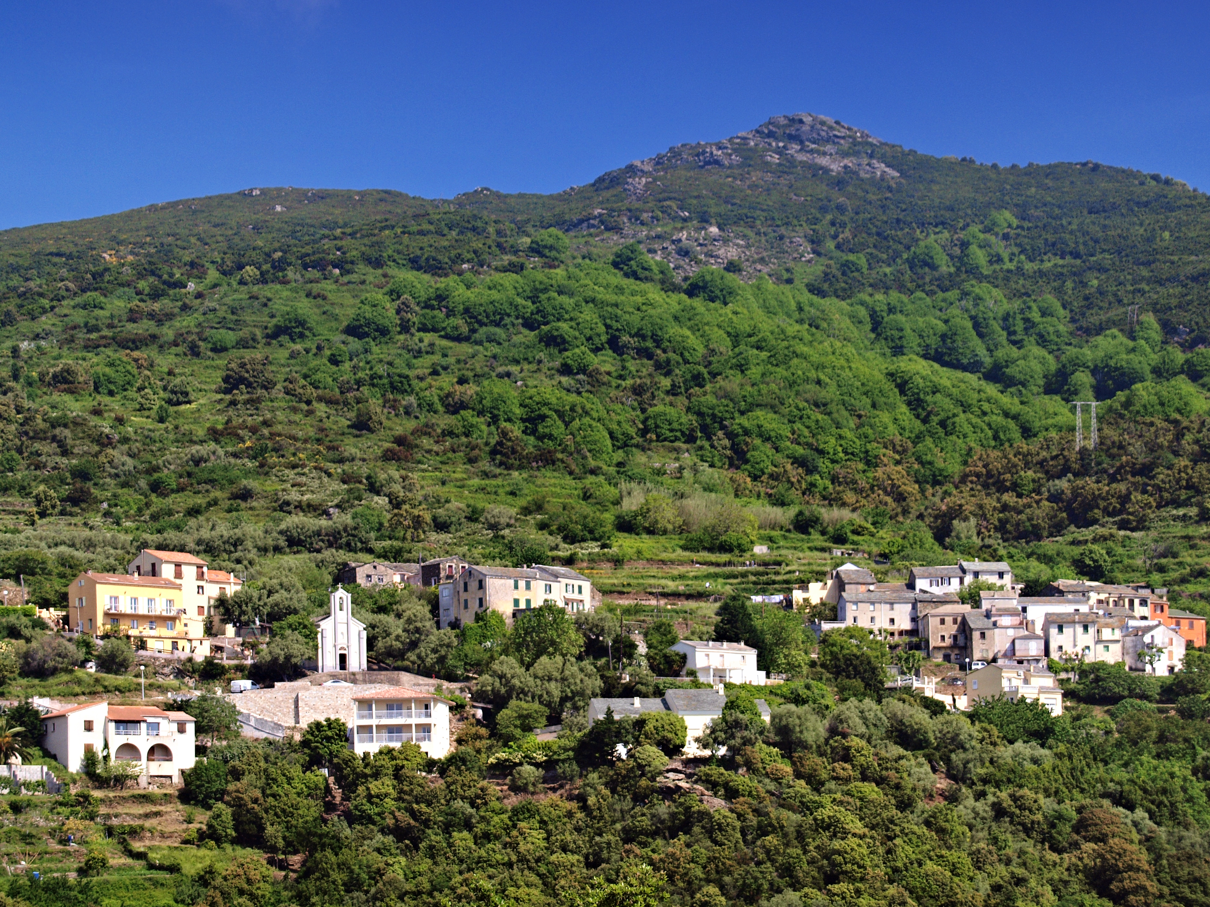 Ville-di-Pietrabugno (Corsica) - Alzetu